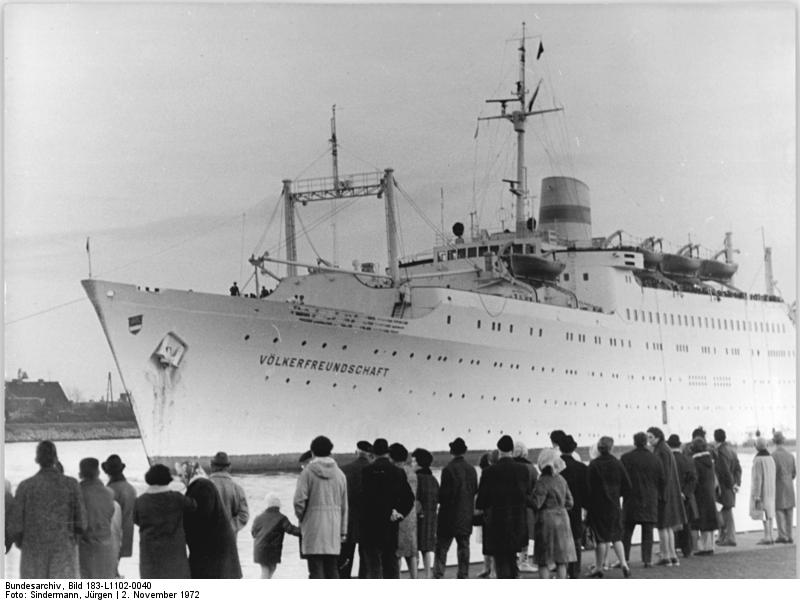 ADN-ZB Sindermann-2.11.72 Rostock: Arbeiter und Künstler auf großer Fahrt. Auf große Fahrt in Richtung Leningrad ging am 2.11.72, vom Warnemünder Hafen aus das DDR-Touristenschiff "Völkerfreundschaft". An Bord befinden sich 400 der besten Arbeiter aus elf Betrieben des Werkzeugmaschinen-Kombinats "7. Oktober" und 150 Künstler und Kulturschaffende des Berliner Kulturbundes."